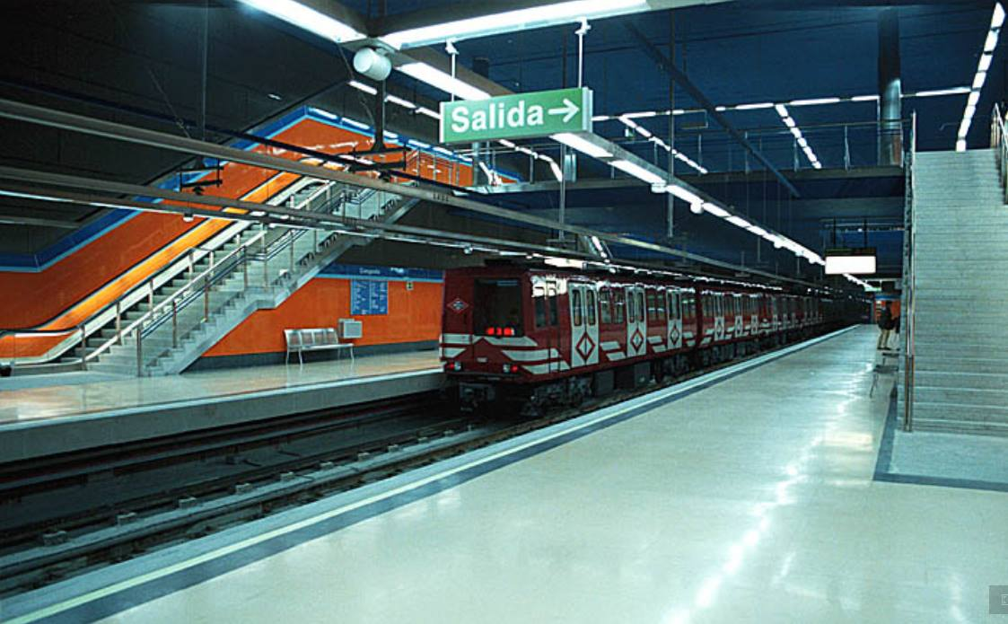 Tren de la serie 2000 con su esquema rojo